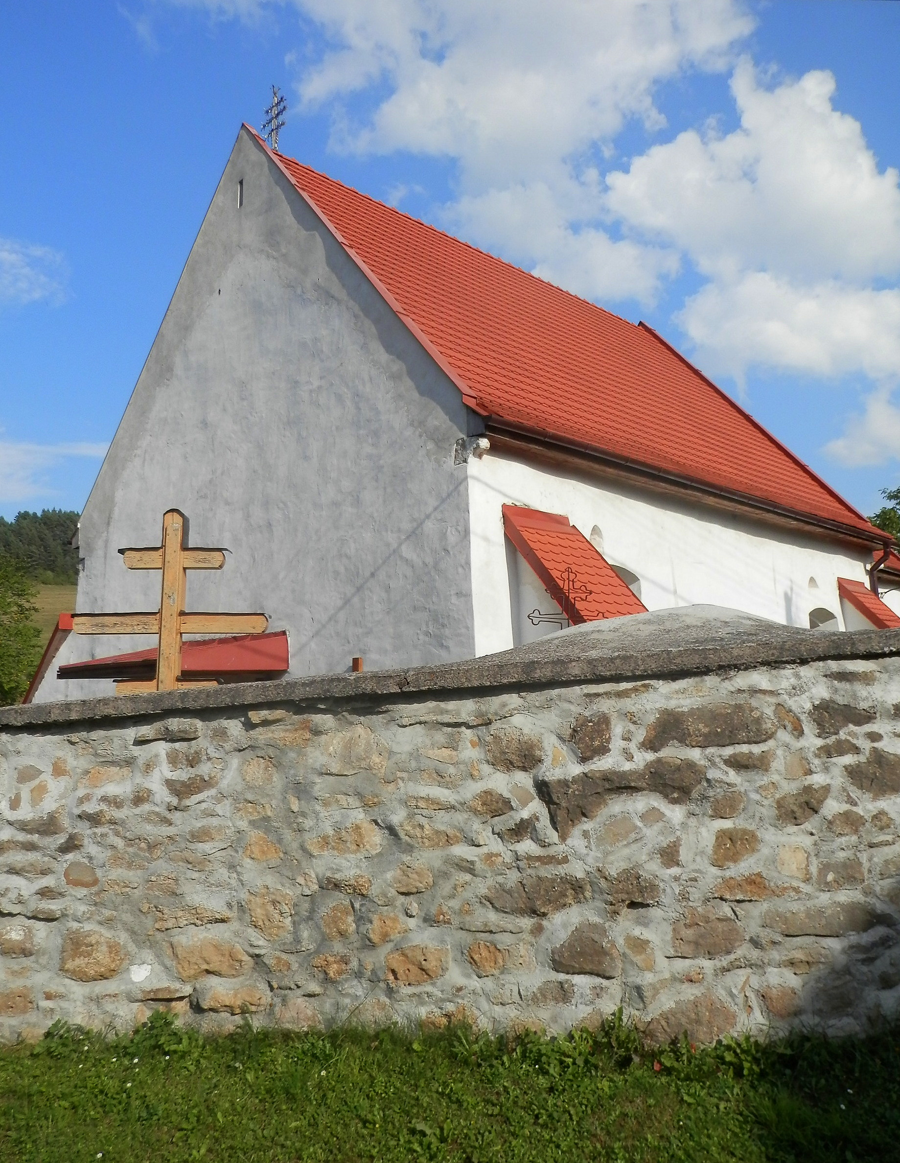 Gréckokatolícky chrám Ochrany Presvätej Bohorodičky, z roku 1370. Prevládajúci sloh gotika. Kamenný múr ohradný okolo gréckokatolíckeho chrámu Ochrany Presvätej Bohorodičky. Doba vzniku 16.storočie. Obec Klenov, okres Prešov.